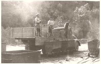 Српски (ћирилица): Радници на истовару руде магнетита која се камионима довозила из Рудне Главе у Мајданпек. Снимак из 1950. године.